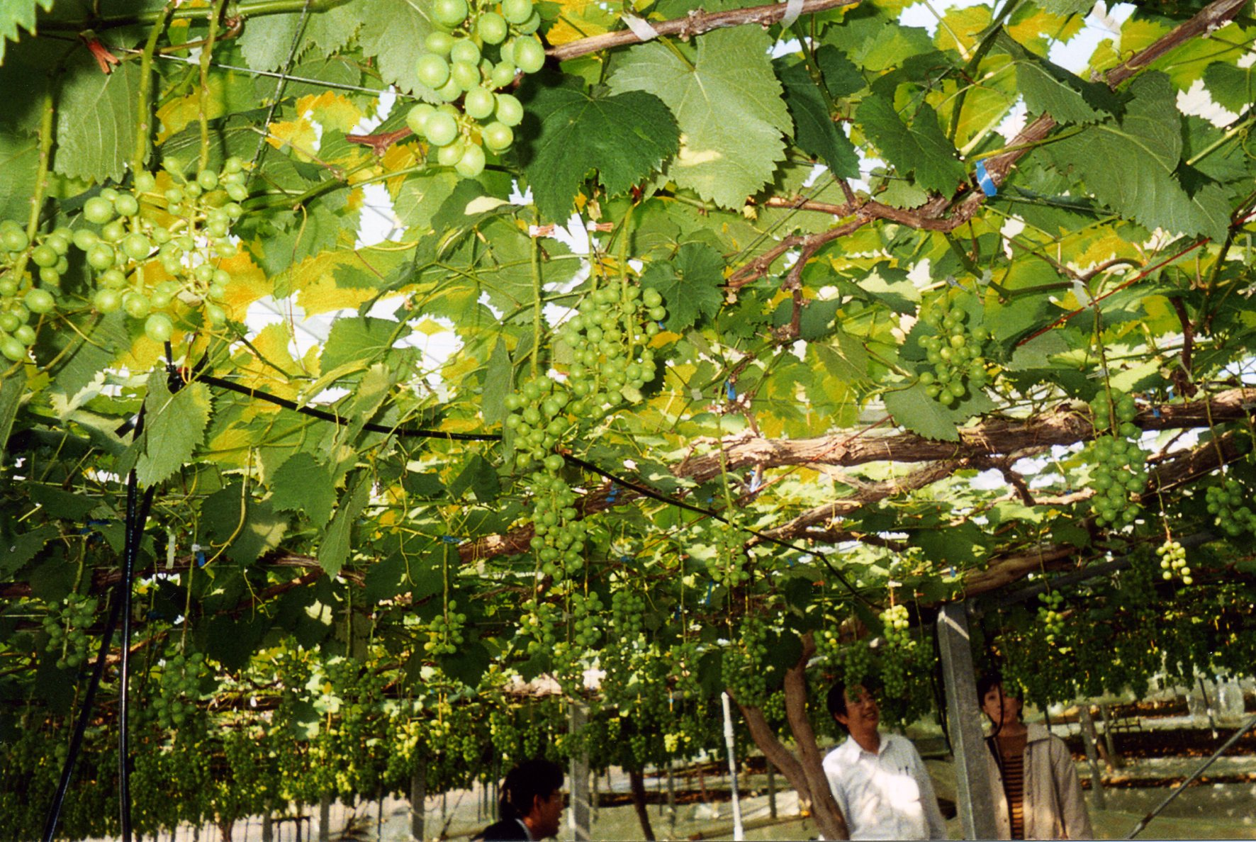 Katsununuma 2004